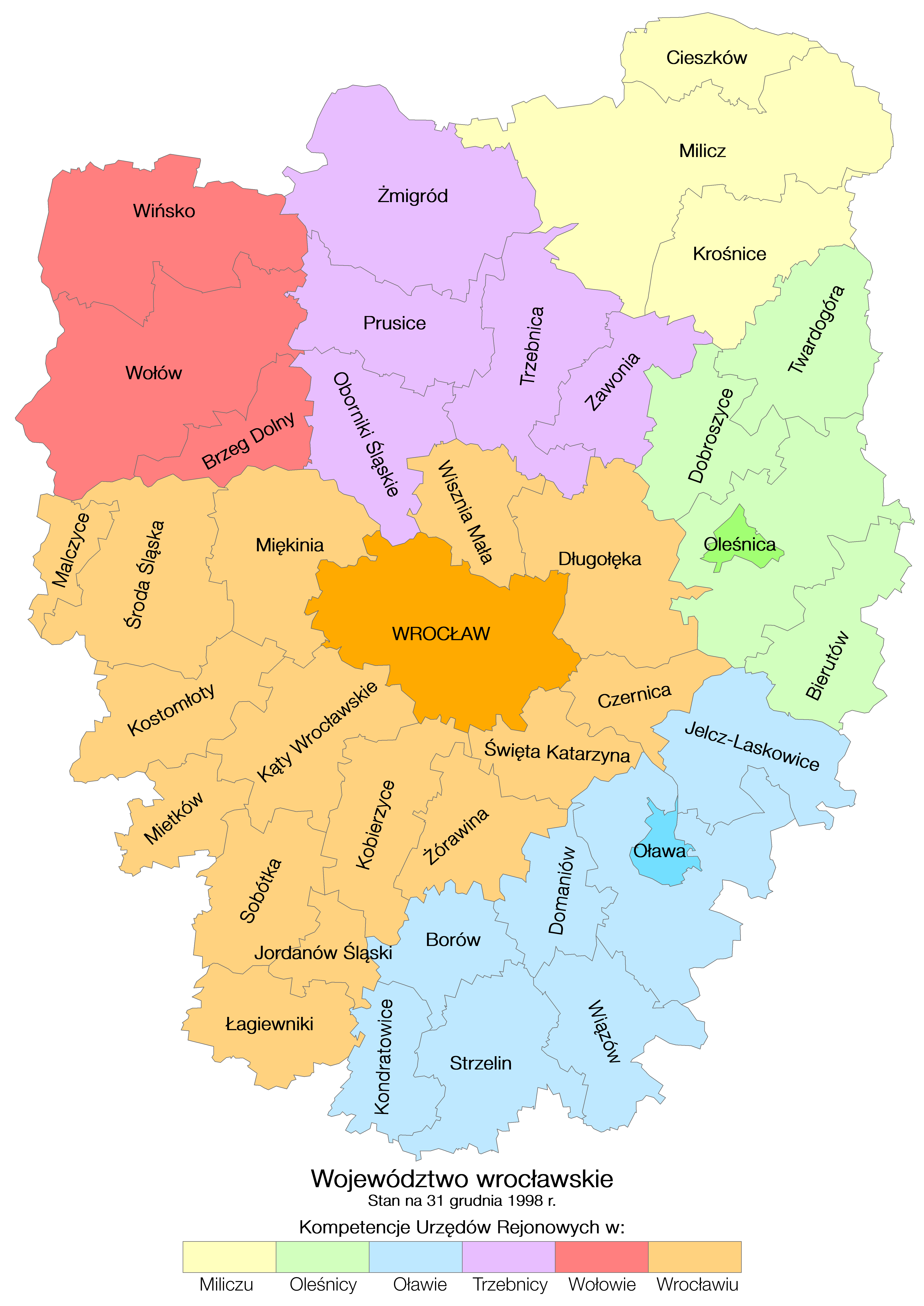 Mapa województwa wrocławskiego w ostatnim dniu istnienia (31 grudnia 1998)